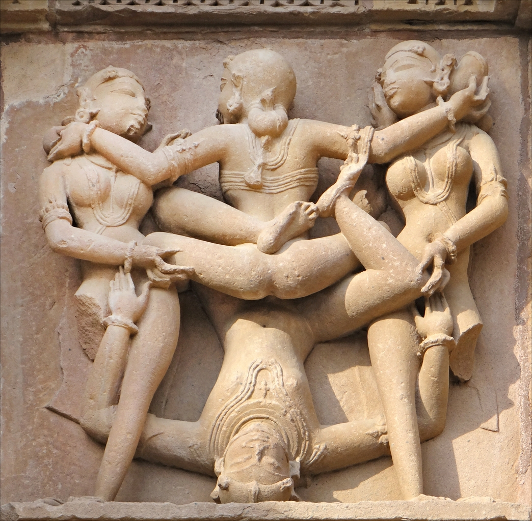 Sculptures murales d'inspiration tantrique sur les murs du temple Kandarîya Mahadeveda à Khajuraho. Pour le Tantrisme, il ne s'agit pas de représentations de poses sexuelles mais de celles de couples yogi unis dans l'extase et servant de symbole universel à l'accomplissement spirituel (Genetical craftmanship of the word of God). Le Tantrisme tente de saisir la nature du temps et de remonter l'échelle de la Genèse en réveillant toutes les énergies et les émotions disponibles, pour les rassembler et en faire le véhicule vers l'Illumination. Ce temple est dédié à Shiva, il a été construit entre 1025 et 1050 Le Temple de Kandariya Mahadeva est le plus grand et le plus décoré de l'ensemble de temples hindouistes de Khajuraho dans l'état du Madhya Pradesh en Inde. Il est considéré comme l'un des meilleurs exemples des temples de l'époque médiévale en Inde. Extrait de l'article de Wikipedia sur le temple (voir le plan) ____________ Les temples de Khajuraho sont inscrits sur la liste du patrimoine mondial de l'UNESCO. A l'époque médiévale, le site appelé Jejakbhukti, était la capitale du royaume des rajas Chandelas qui ont pris le pouvoir au début du Xème siècle. Ils y ont fait construire 85 temples dont seulement 25 existent encore aujourd'hui dans différents états de conservation mais tous ont été restaurés. Le site de Khajuraho a perdu de son importance vers 1500. La plupart des temples sont construits en grès, certains sont en granite. Ils font partie des chefs-d’œuvre de l'art hindou.